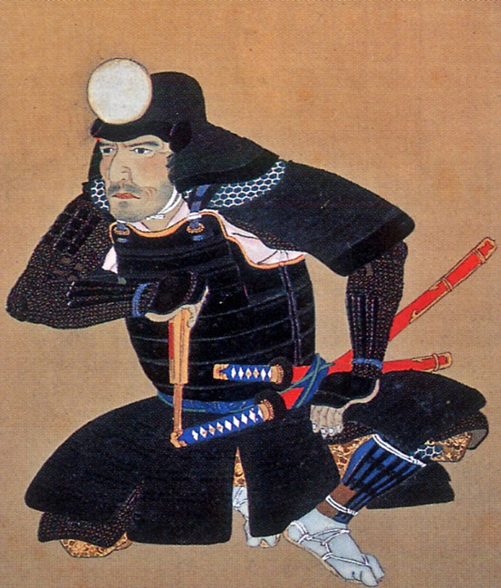 後藤基次（ごとうもとつぐ）。安土桃山時代から江戸時代にかけての武将。 後藤又兵衛（ごとうまたべえ）の名でも知られている。